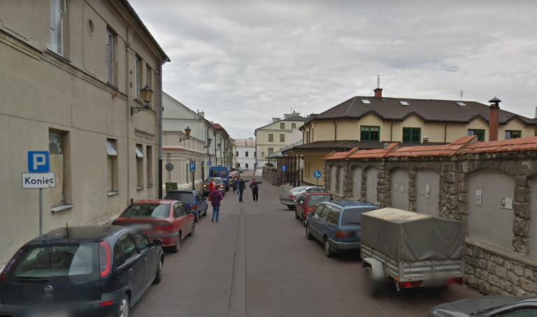 La vido de strato de Ludoviko Zamenhofo en Zamość